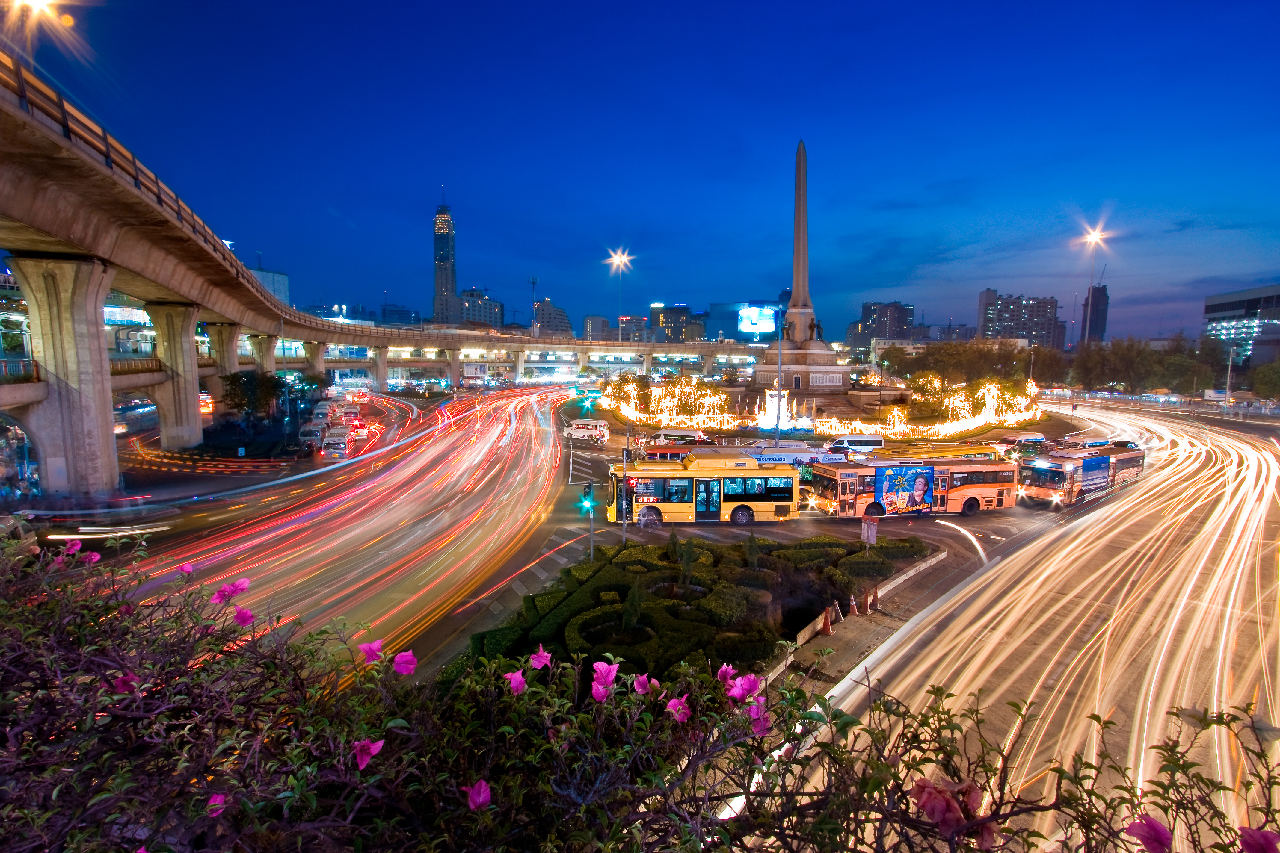 อนุสาวรีย์ชัยสมรภูมิ